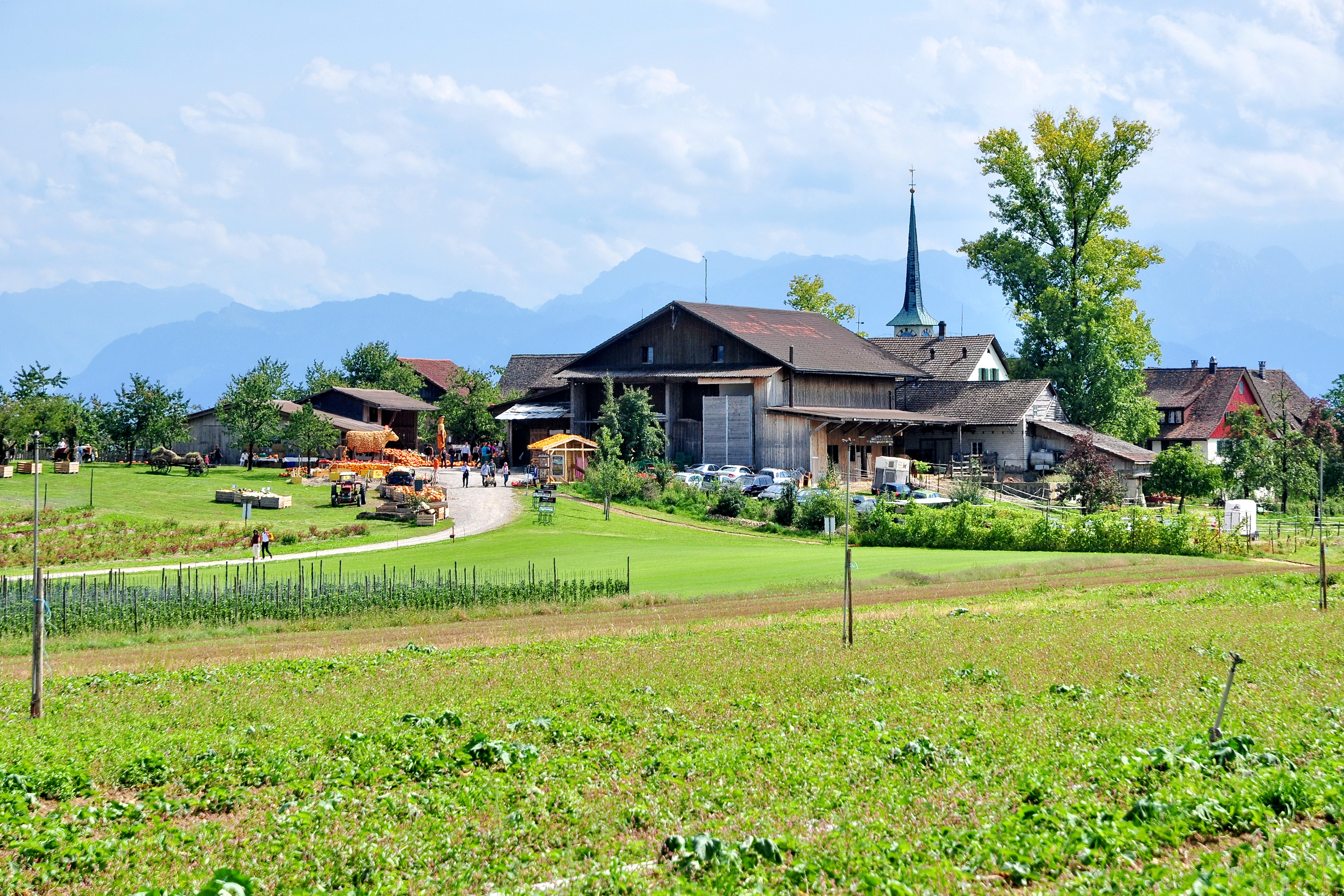 Jucker Farmart in Seegräben (Switzerland)